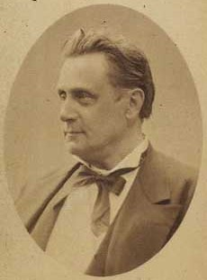 Christian Ludvig Adolph Schiemann (1824-1915), Danish oboist